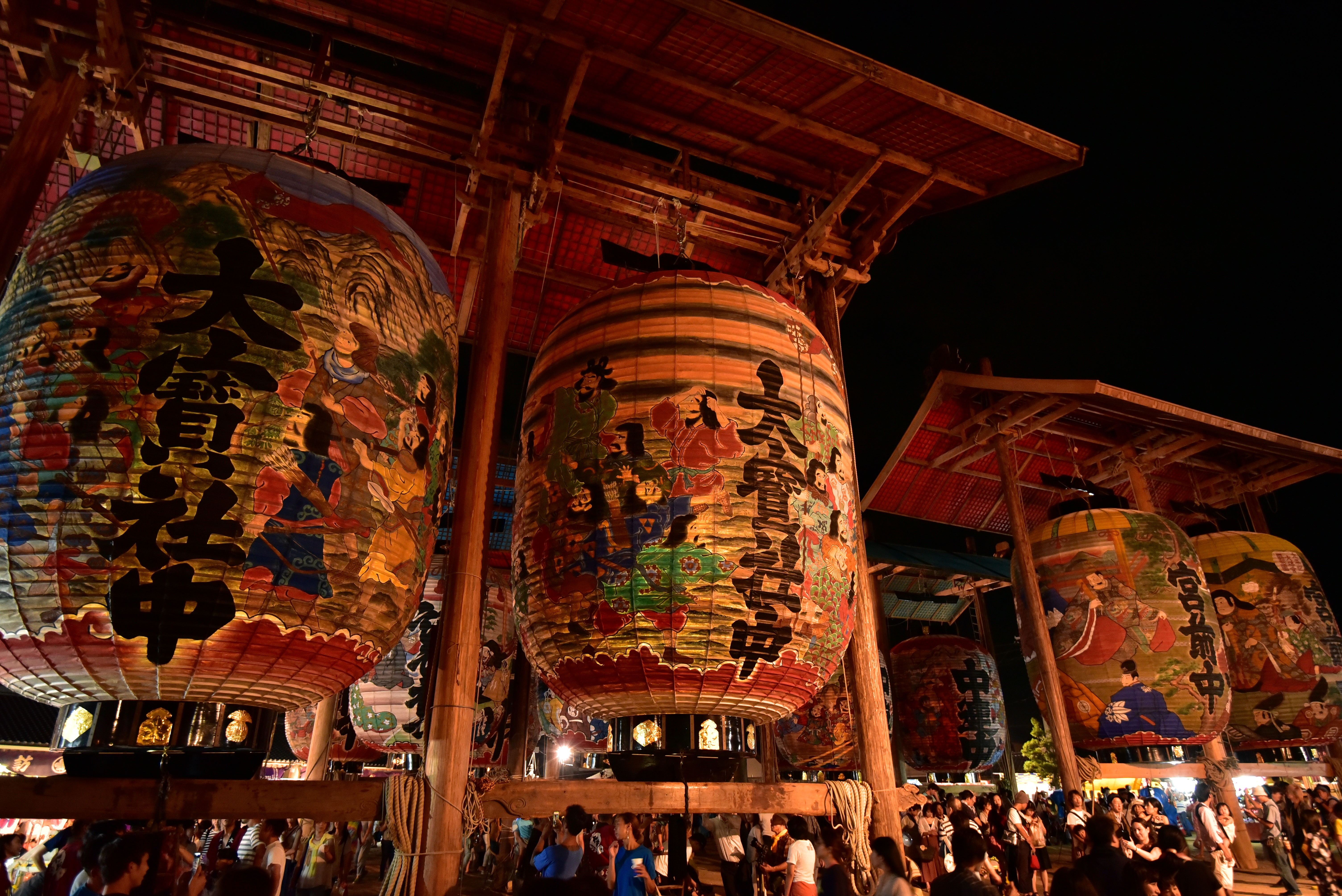 三河一色大提灯まつり。三河一色諏訪神社。愛知県西尾市一色町。